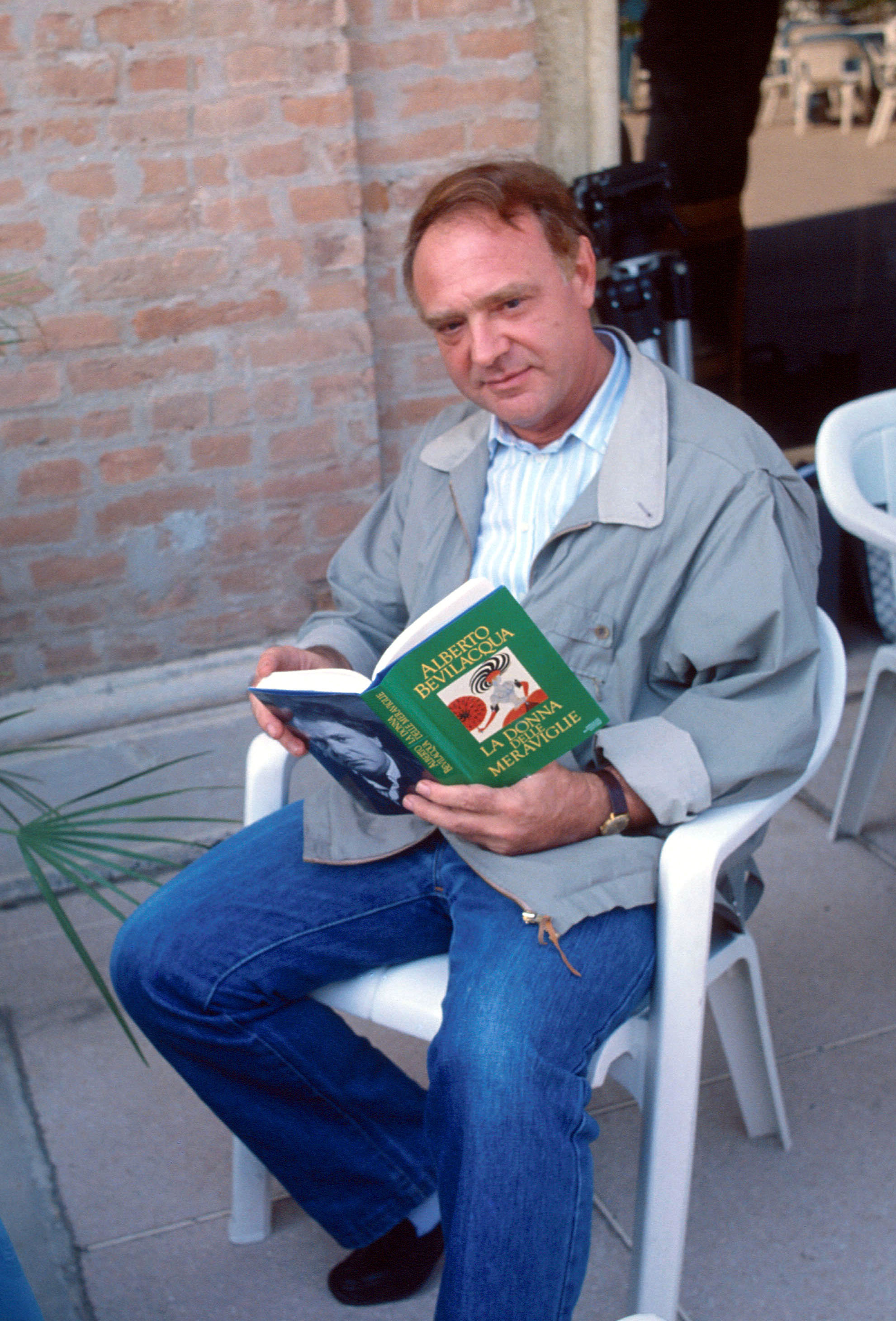 lo scrittore alla Mostra del cinema di Venezia nel 1984